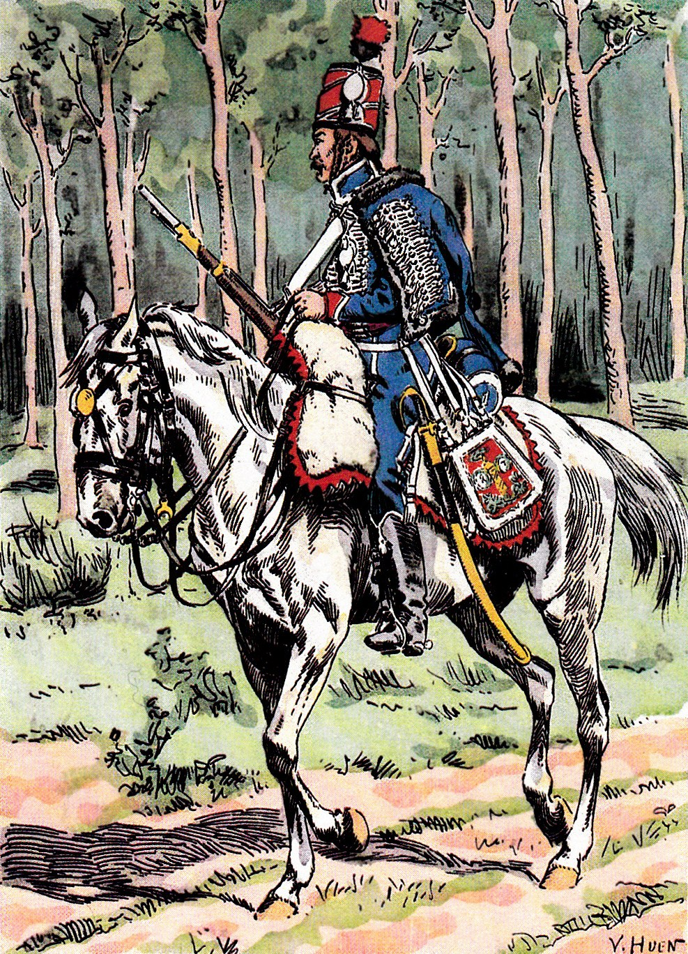 Hussard du 1er régiment, 1800. Grande tenue.